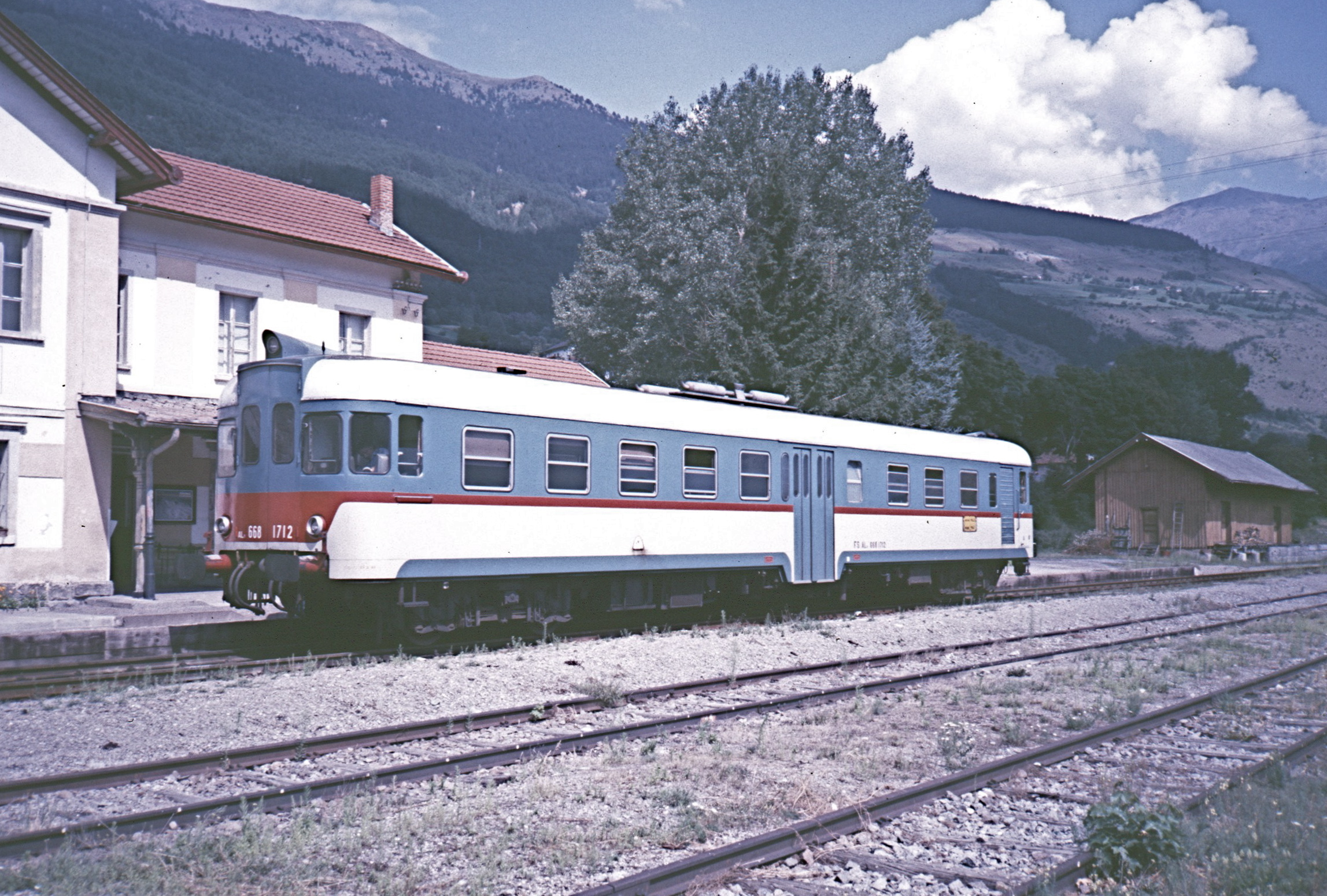 Zweimotoriger dieselhydraulischer Personentriebwagen der Italienischen Staatsbahnen, abgekürzt FS, italienisch Ferrovie dello Stato, in Mals im Südtirol. Dies am Ende der Bahnstrecke Meran–Mals, die umgangssprachlich auch als Vinschgaubahn, italienisch Ferrovia della Val Venosta, bezeichnet wird. Dieser Triebwagen gehört zur FS Serie ALn 668.1700 und wurde in den Jahren 1971 und 1972 von Breda Costruzioni Ferroviarie, abgekürzt BCF, erbaut.